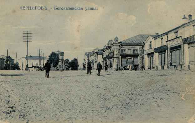 Богоявленська вулиця Чернігова (тепер частина вулиці Шевченка) на старій світлині